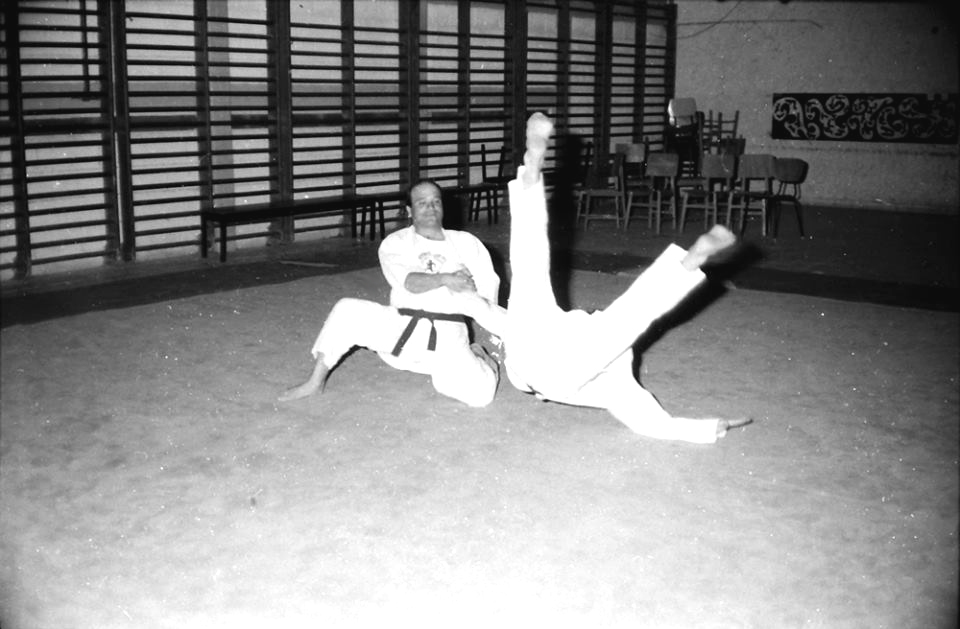 מוריס סמדג'ה בפעולת הדרכה במועדון הנעורים בבאר שבע